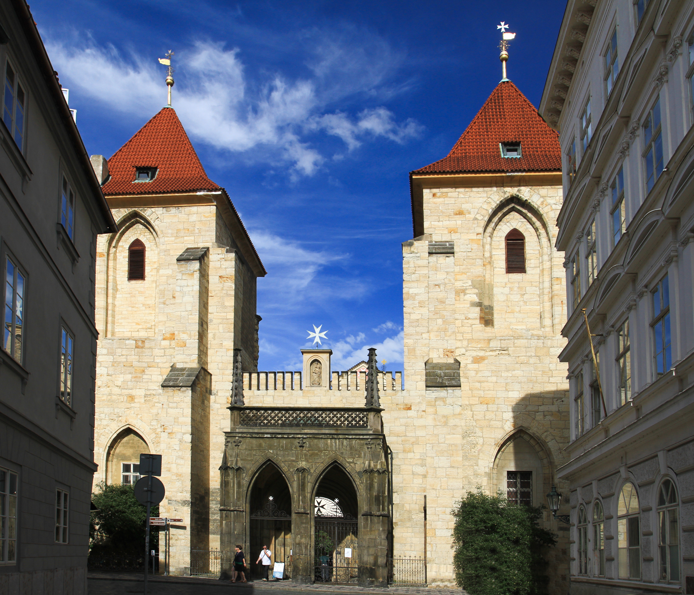 Komenda řádu Maltézských rytířů (Malá Strana), Praha 1-Malá Strana, Velkopřevorské náměstí 485/4, 608/5a, 489/6, Lázeňská 482/5, 485/2, 287/4, 286/6, Saská 286/5, Hroznová 489/3